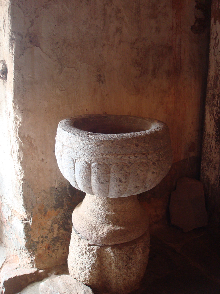 Pila de Agua Bendita - Iglesia de San Miguel(Paradela de Muces)